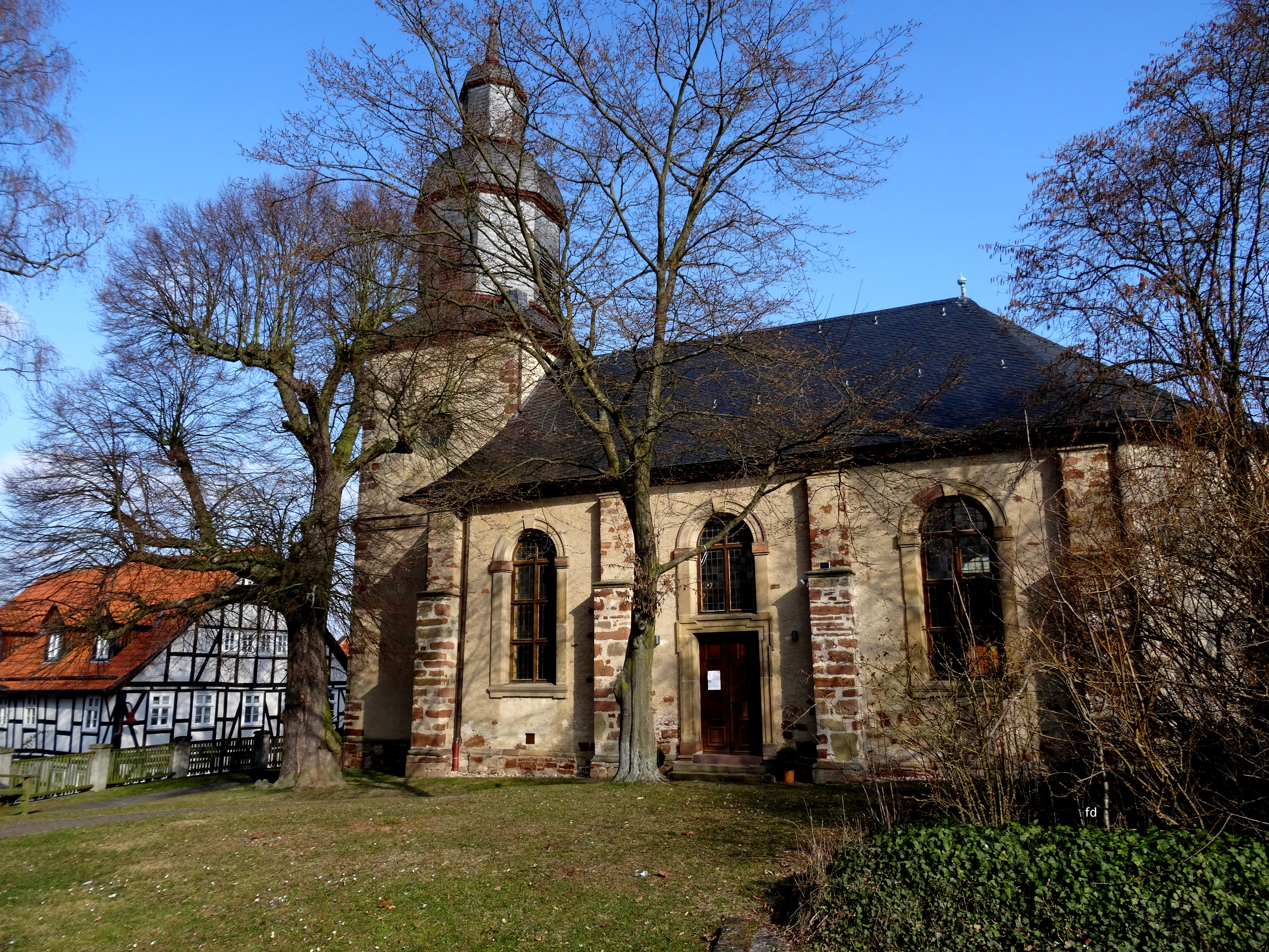 Altwildungen Nicilai-Kirche